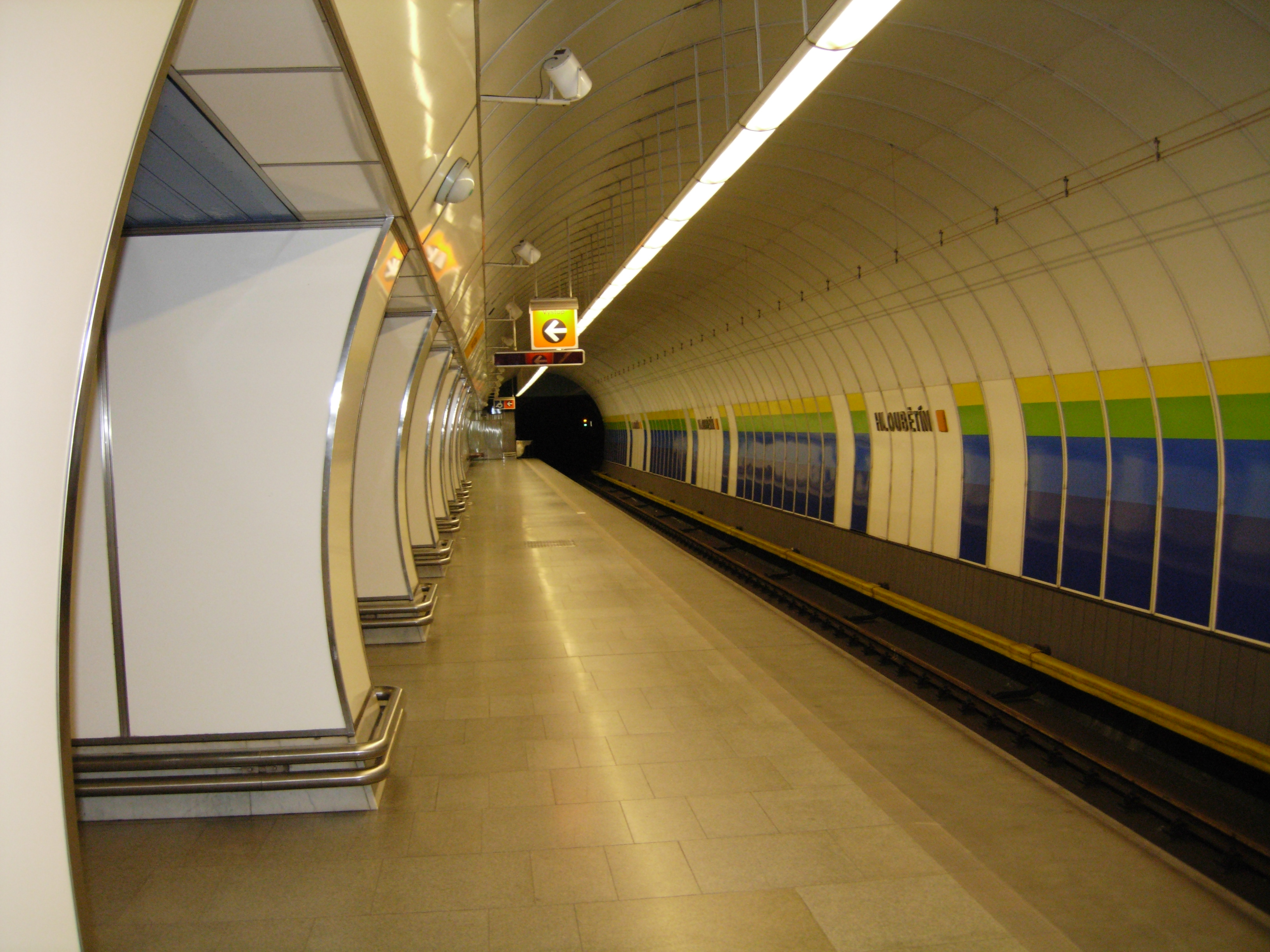 Stanice metra Hloubětín na trase B v Praze.